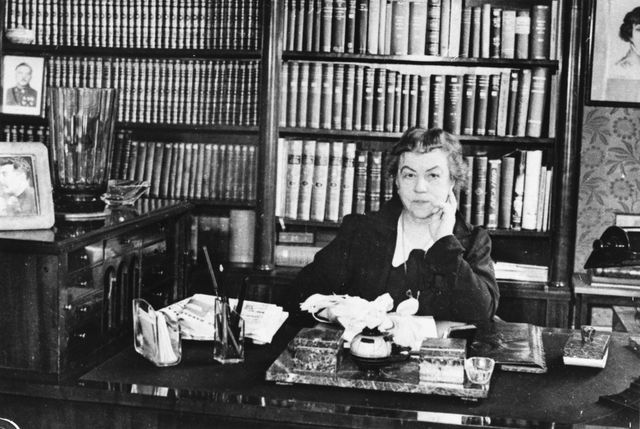 Arbetsplatsen i Stockholm. Den sovjetiska beskickningen i Stockholm blev ambassad 1943. Porträtt av Stalin på väl synlig plats hörde självklart till rekvisitan vid arbetsbordet.